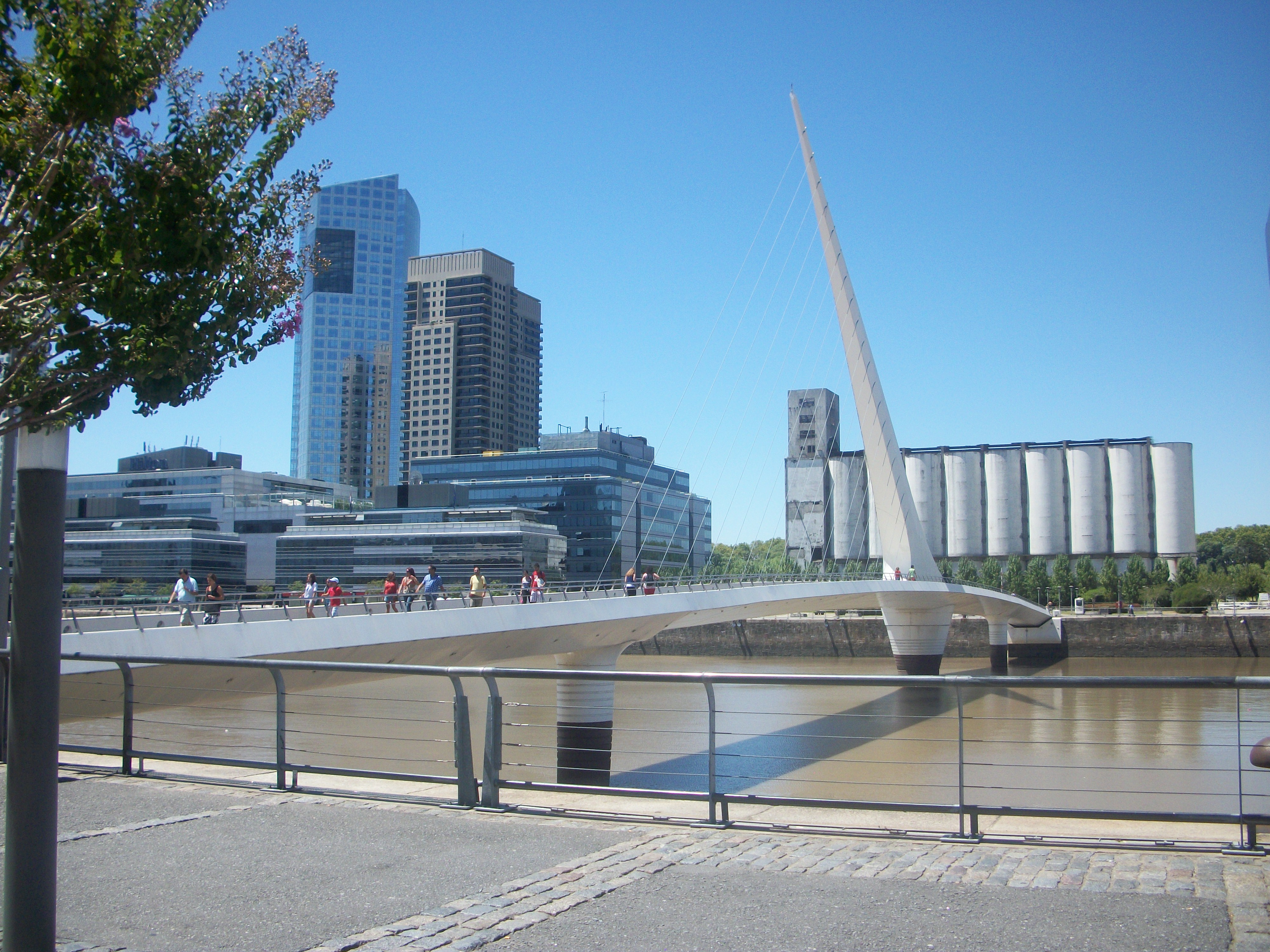 Vease el Puente de la Mujer, de fondo la Torre YPF